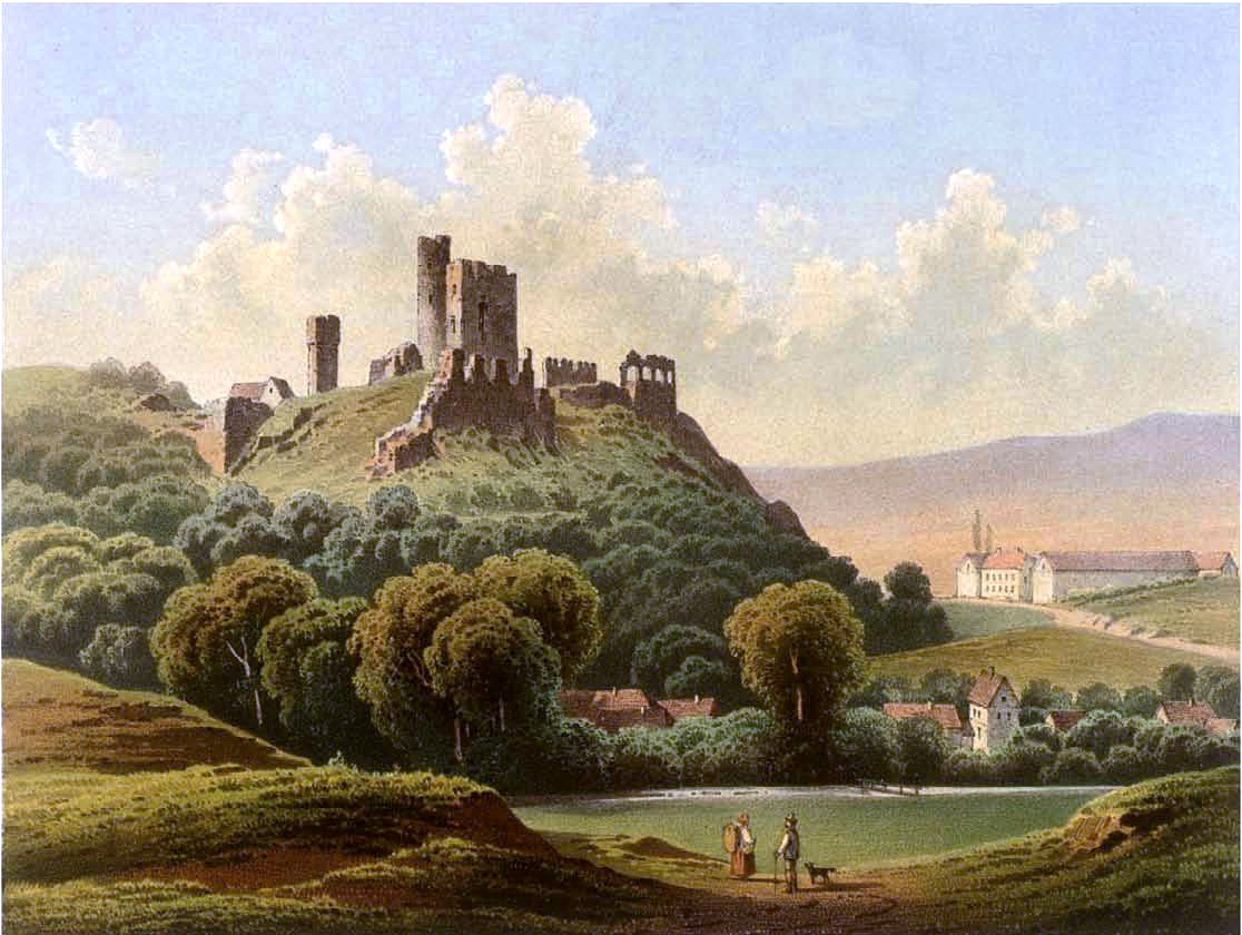 Burg Arnstein, Mansfelder Gebirgskreis, Provinz Sachsen